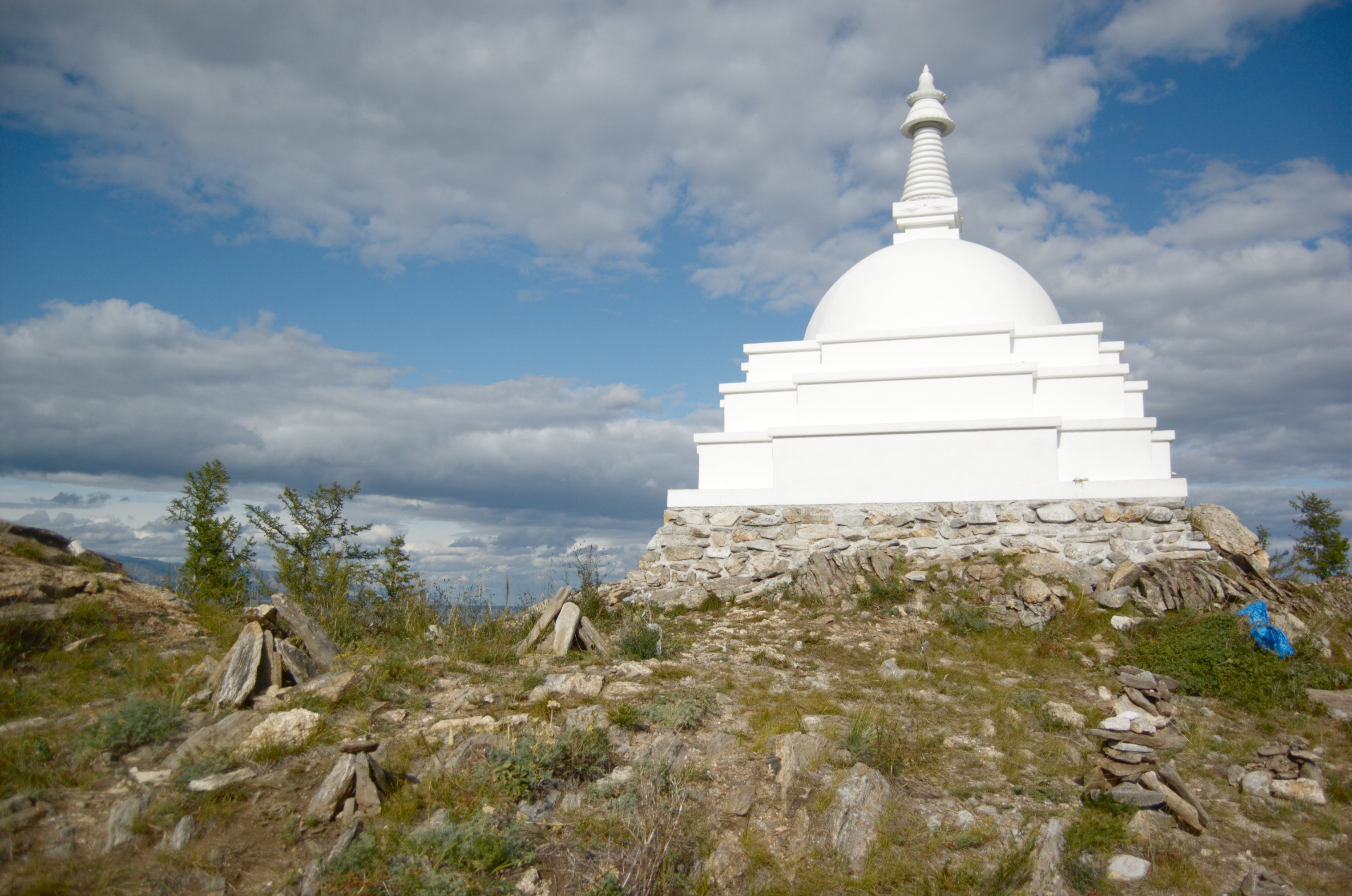 Enlightenment stupa on Ogoi island, Lake Baikal, Russia.